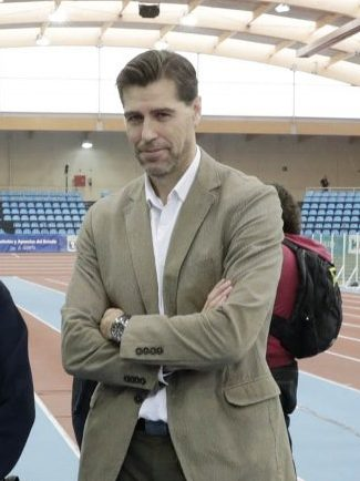 La delegada de Cultura y Deportes del Ayuntamiento de Madrid, Celia Mayer, ha presentado, hoy día 23, el que es considerado el evento de atletismo más importante en pista cubierta de la temporada, el Encuentro Internacional Villa de Madrid, que se celebrará mañana viernes de las instalaciones del Centro Deportivo Municipal Gallur.